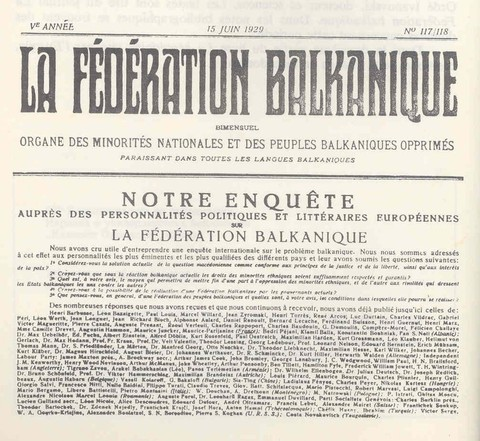 Брой 117-118 на "Федерасион балканик".